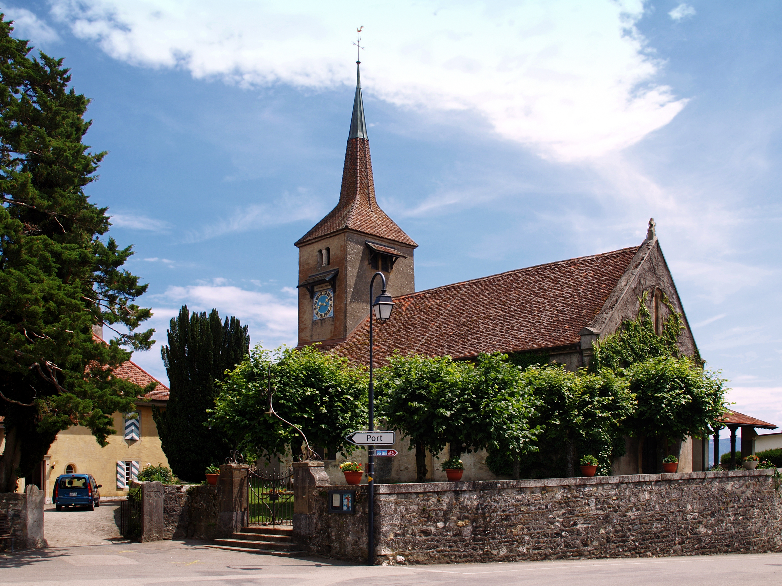 Concise (Suisse) - Église Saint Jean-Baptiste